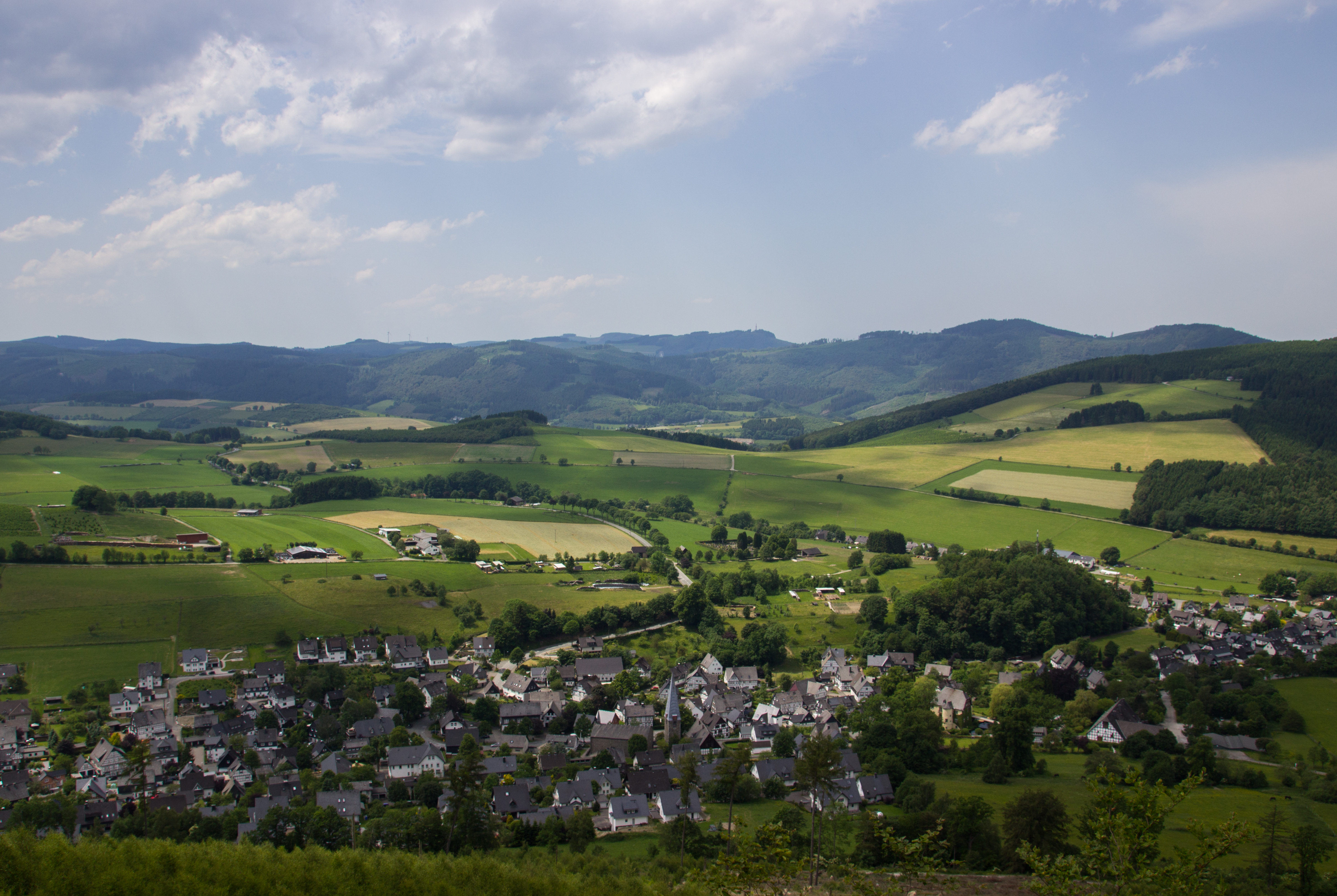 Vorne Bruchhausen und das Landschaftsschutzgebiet Kultur- und Offenlandschaftskomplex Bruchhausen um das Dorf. Berge mit wald gehören zum LSG „Olsberg“ (weite Teile der sichtbaren Landschaft außerhalb des Siedlungsbereichs) – Istenberg, Bruchhausen, Hochsauerlandkreis, Nordrhein-Westfalen, Deutschland. Blick vom Istenberg (Bruchhauser Steine) in Richtung Bruchhausen und das umgebende Land.